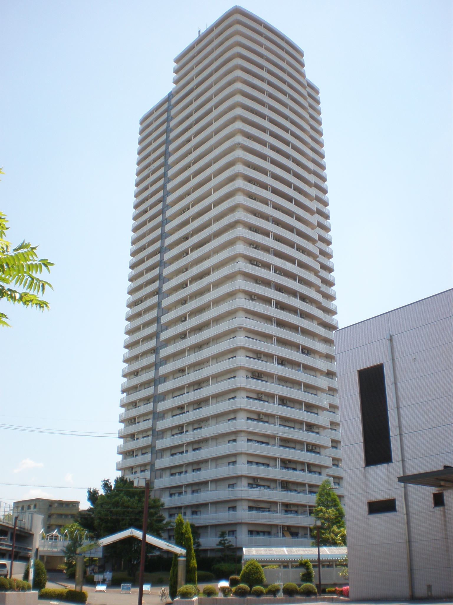 愛知県小牧市にあるスカイステージ33